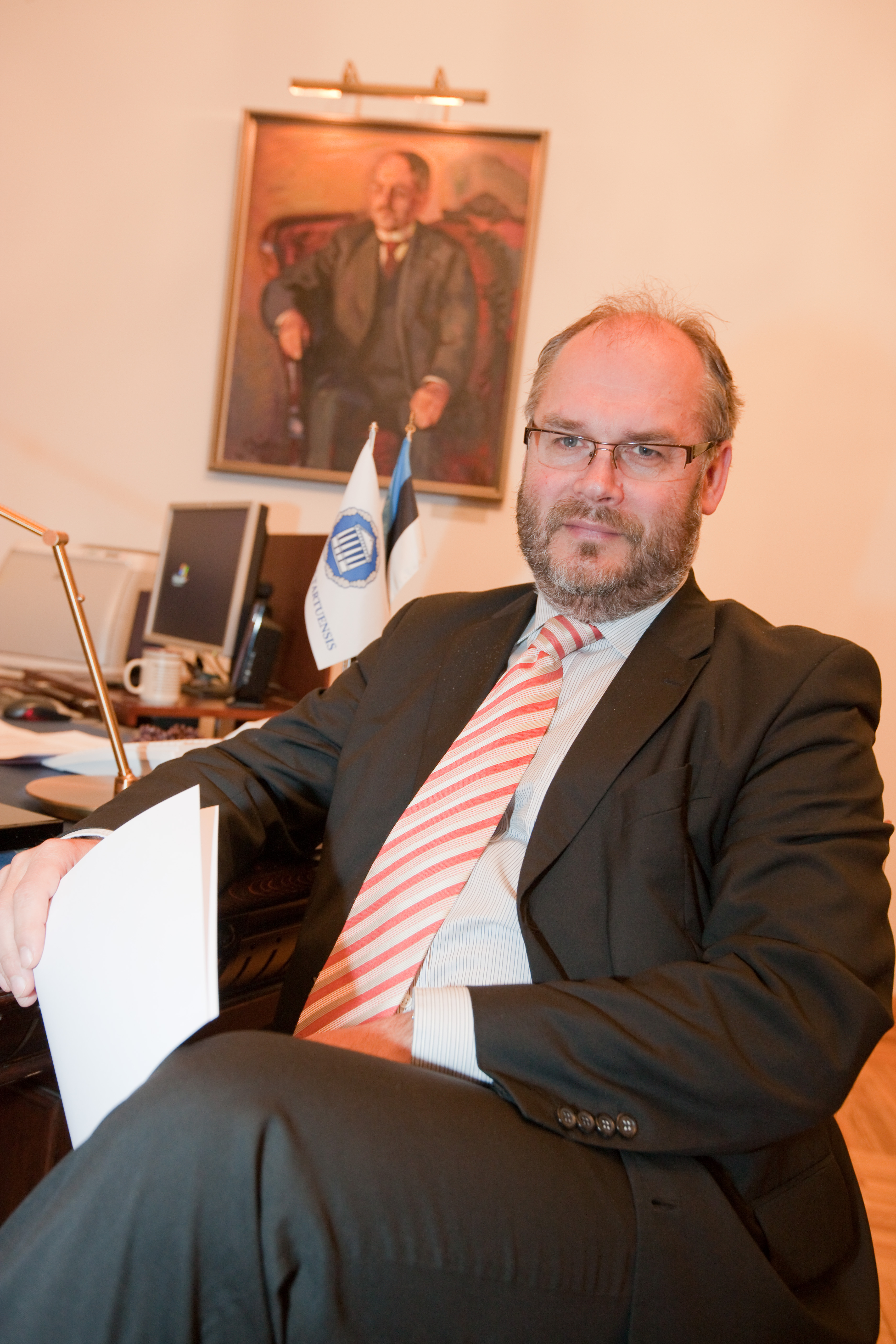 Tartu Ülikooli rektor professor Alar Karis oma töökabinetis 2008. aastal.